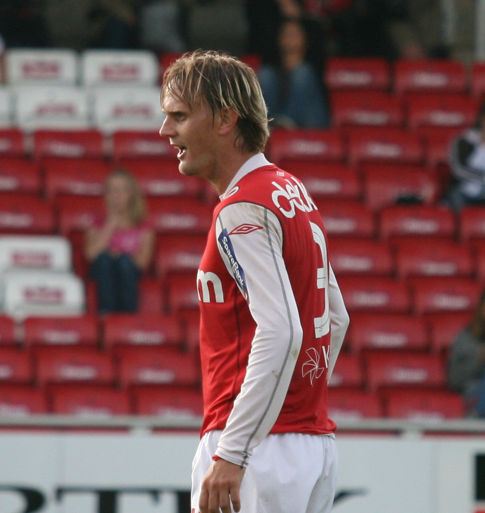 Ronny Espedal